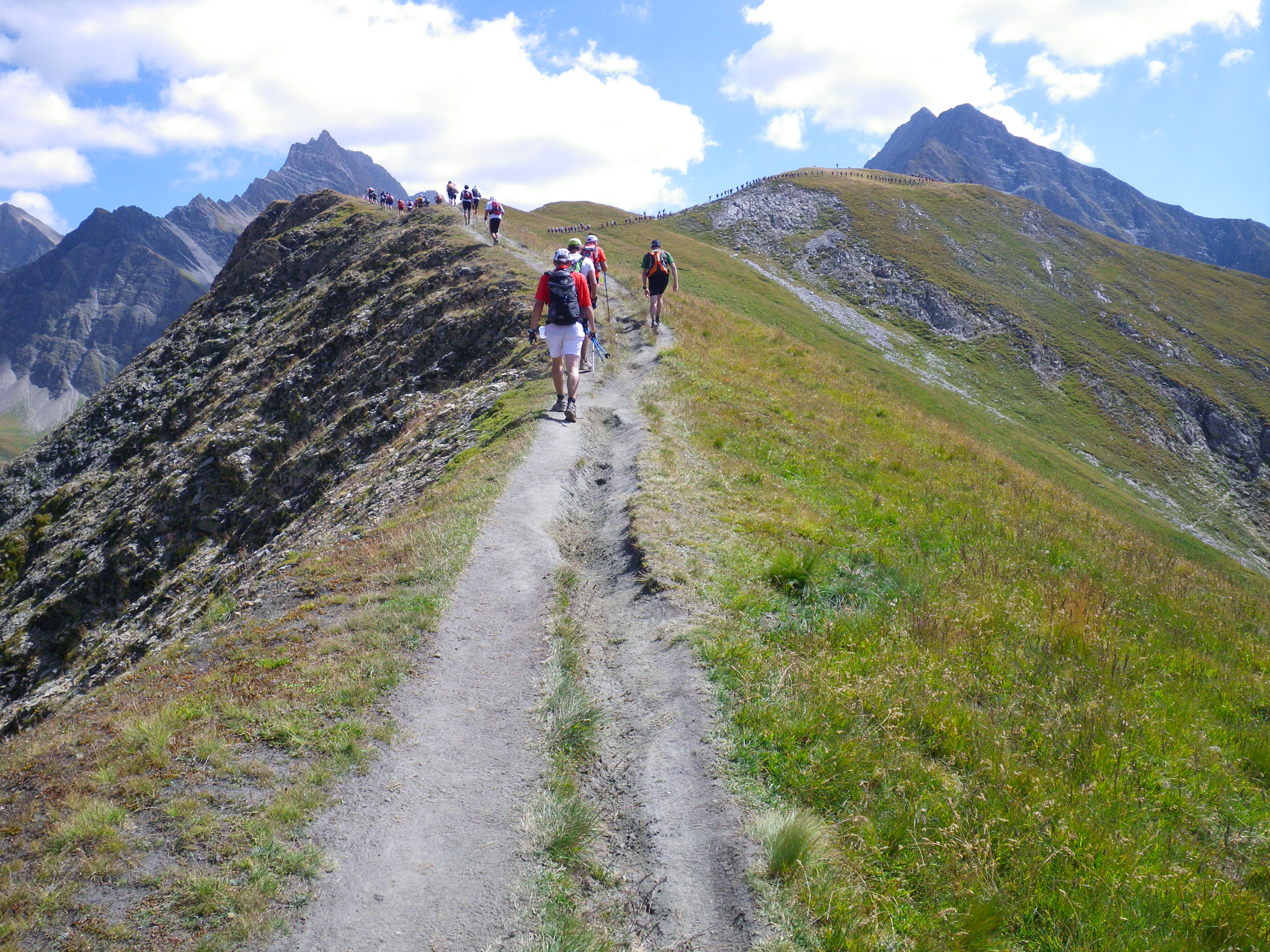 UTMBt